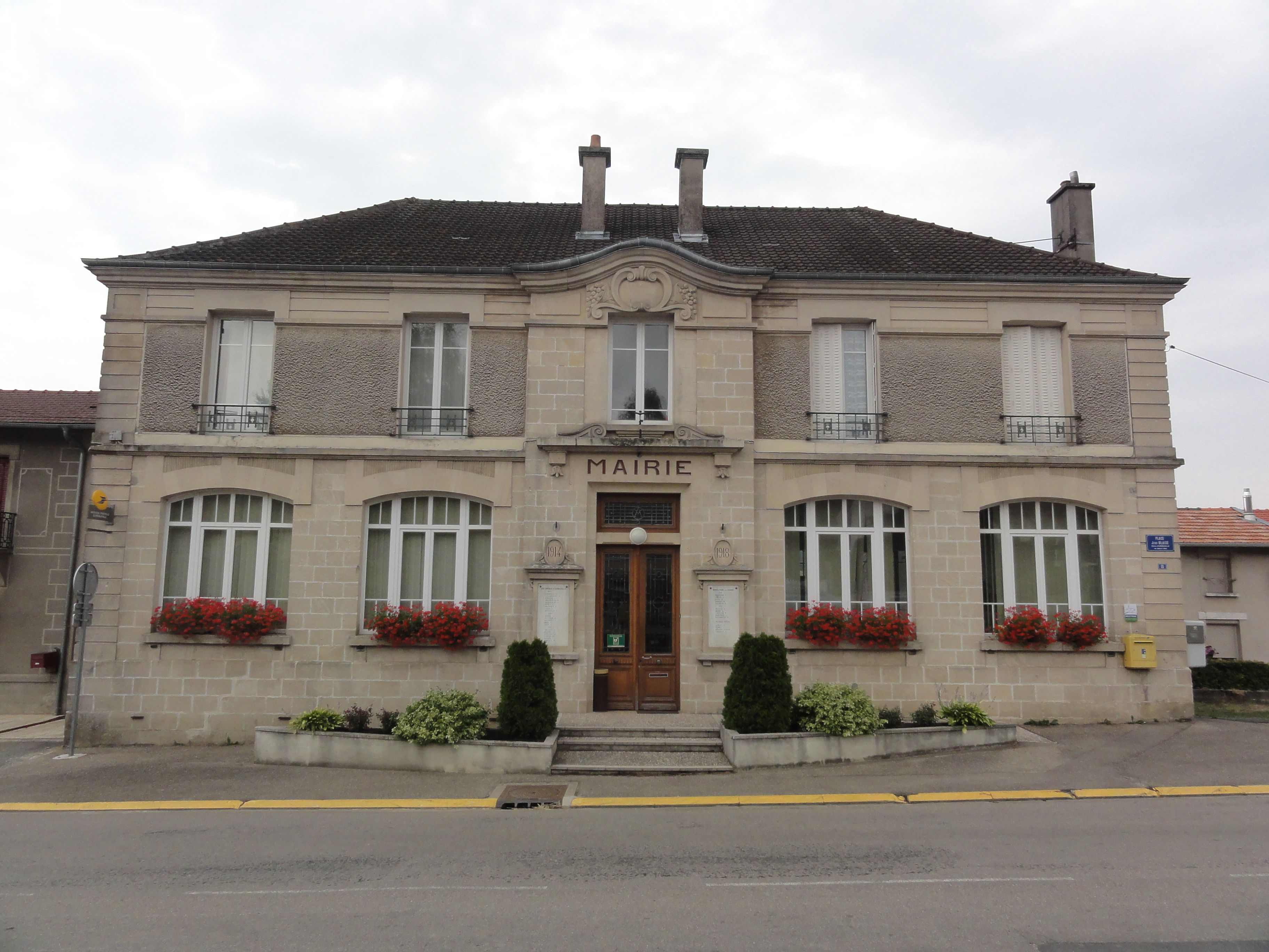 Aubréville (Meuse) mairie